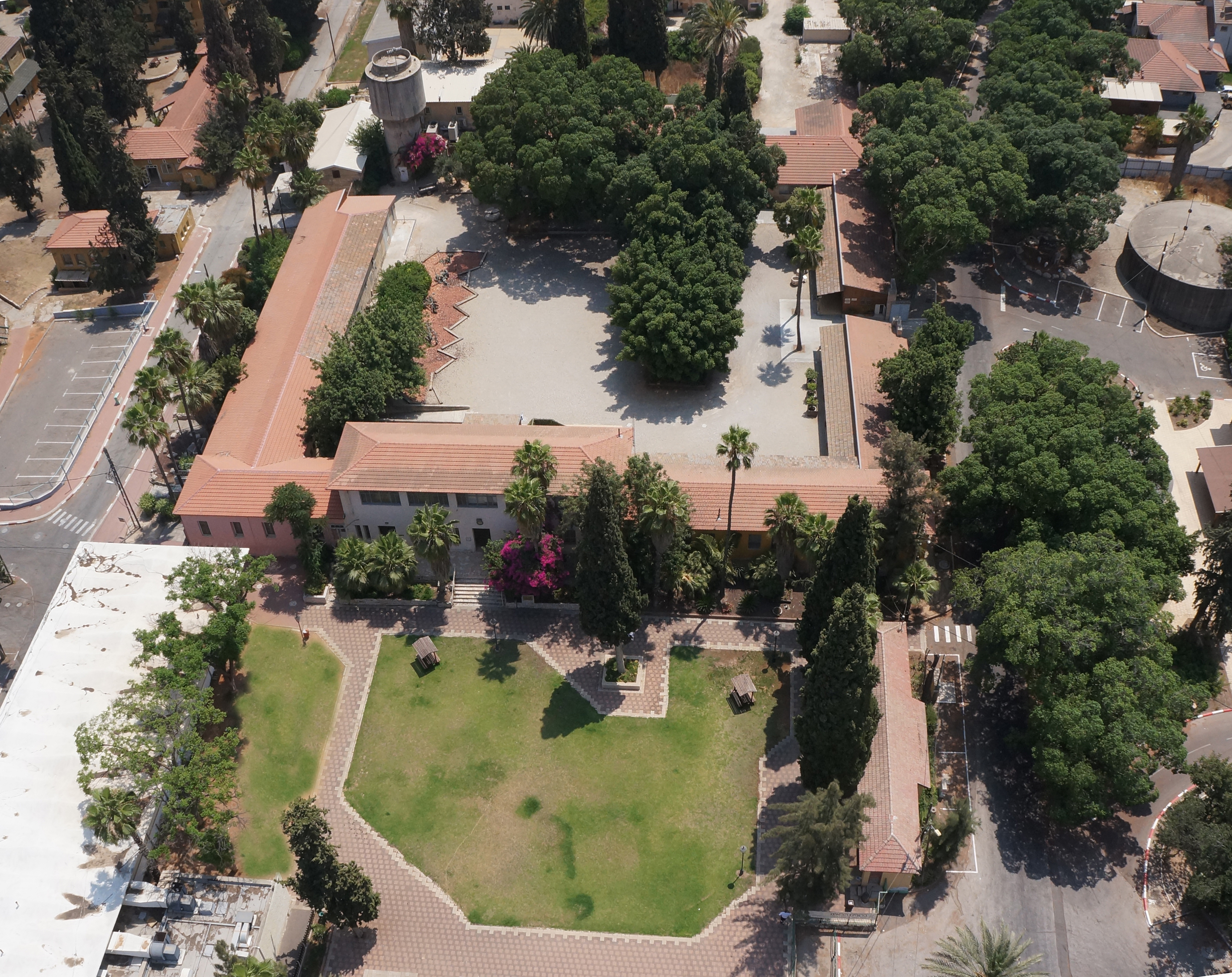 כפר הנוער בן שמן - ככר להמן והחצר הפנימית